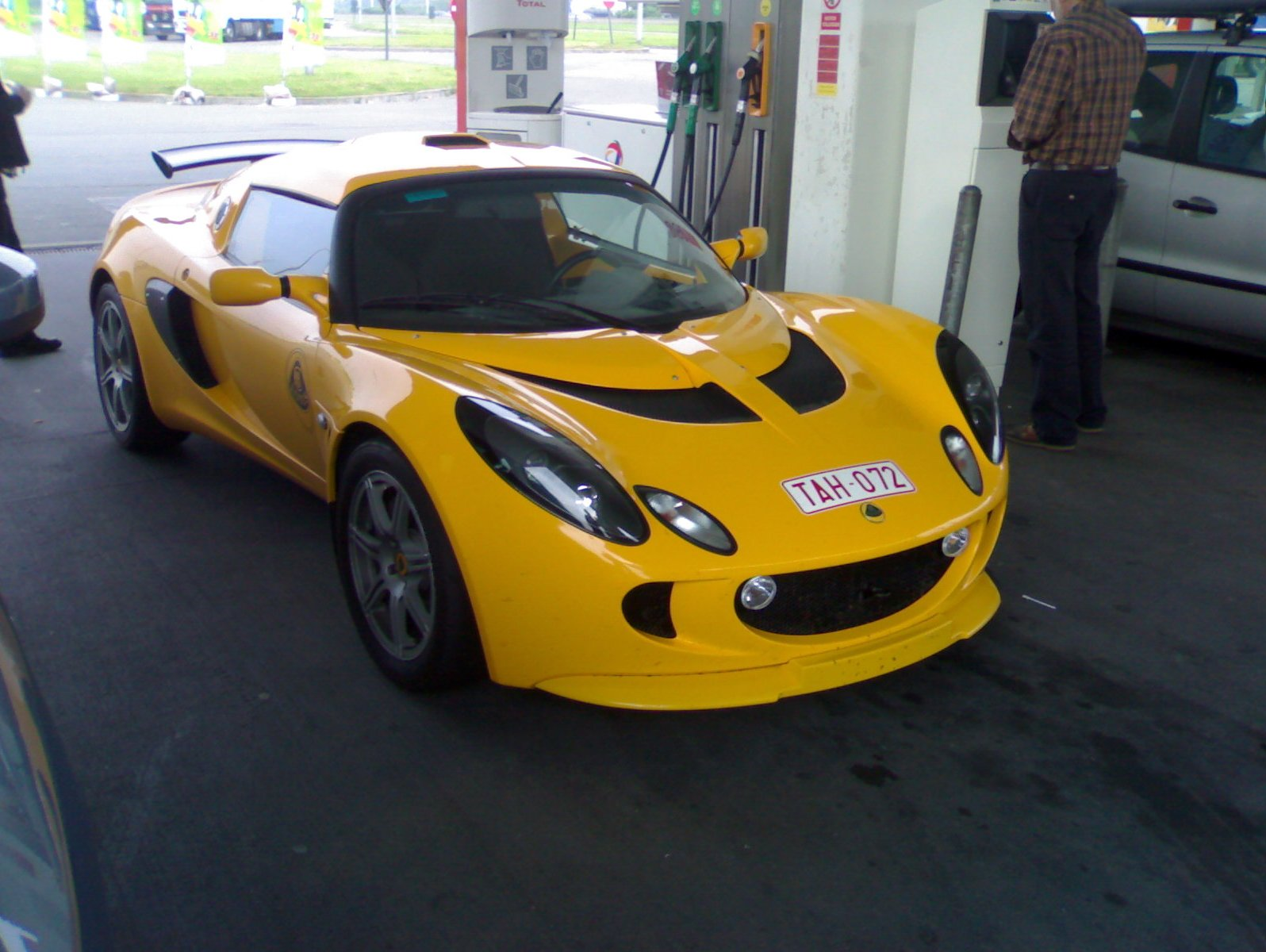 Lotus Exige